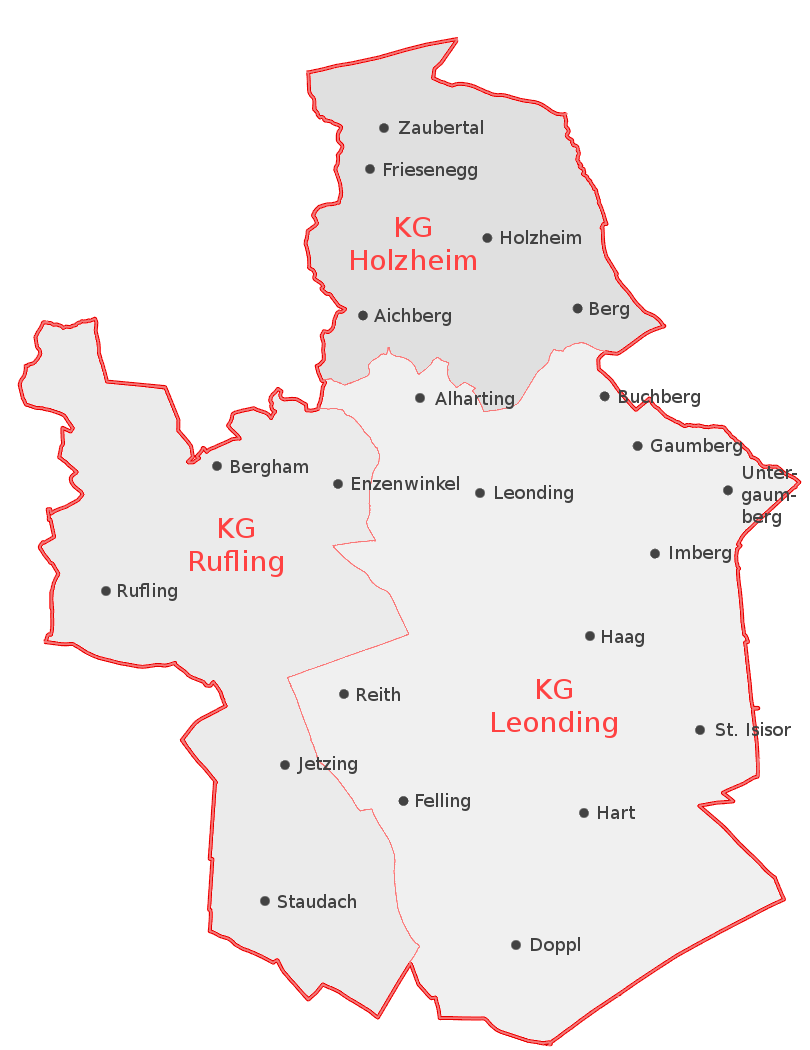 Die Stadt Leonding mit allen Kastralgemeinden und ungefährer Lage der Ortschaften